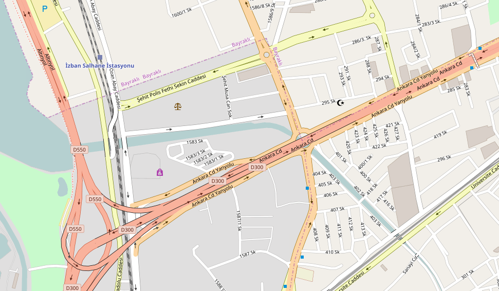 2017 İzmir courthouse attack (Izmir Court of Justice) This map of Bayraklı, Izmir, in front of the Izmir Court of Justice was created from OpenStreetMap project data, collected by the community. This map may be incomplete, and may contain errors. Don't rely solely on it for navigation.